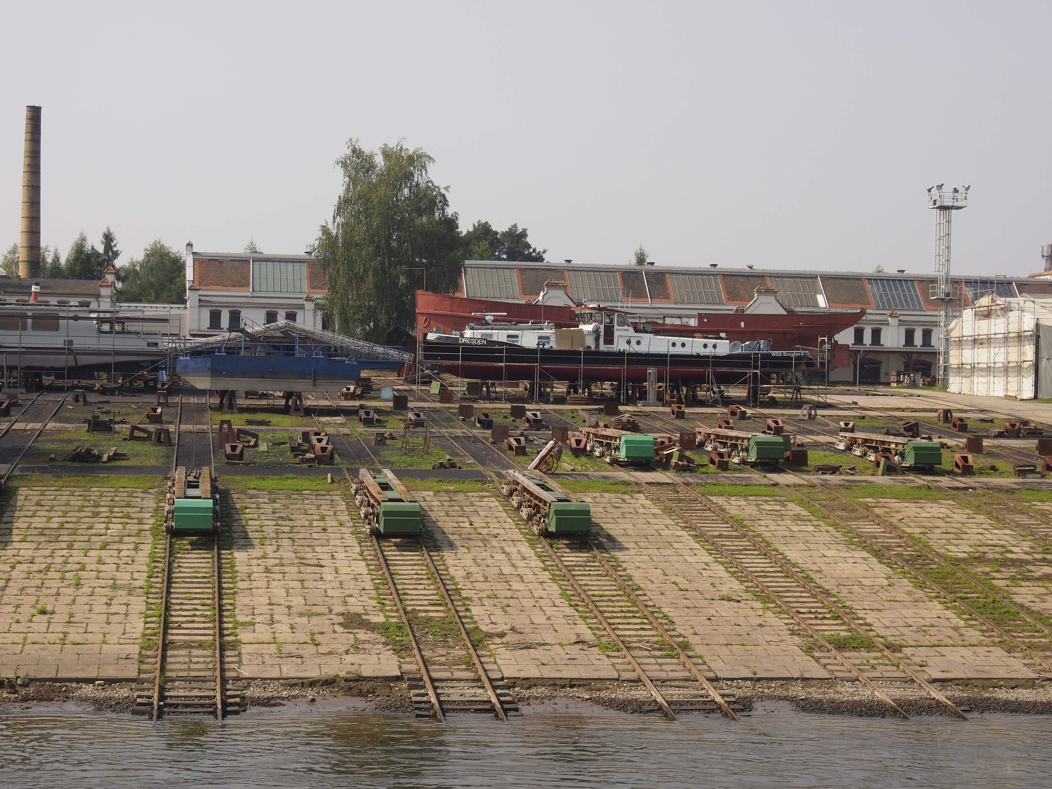 Slipanlage der Schiffs- und Yachtwerft Dresden